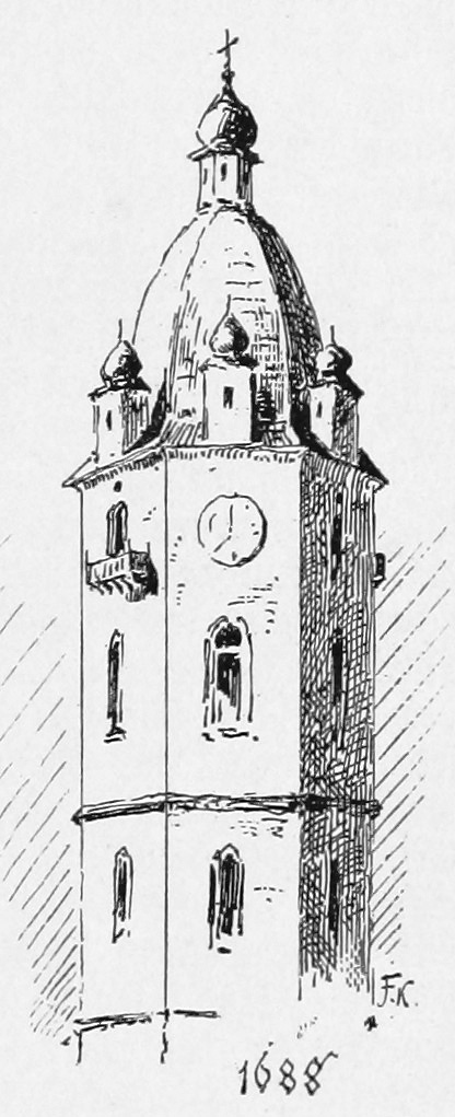 Der Turm der Steyrer Stadtpfarrkirche im Jahre 1688 nach einer Zeichnung Franz Kulstrunks. Originalbeschreibung: Der Pfarrthurm i. J. 1688. Von F. Kulstrunk.